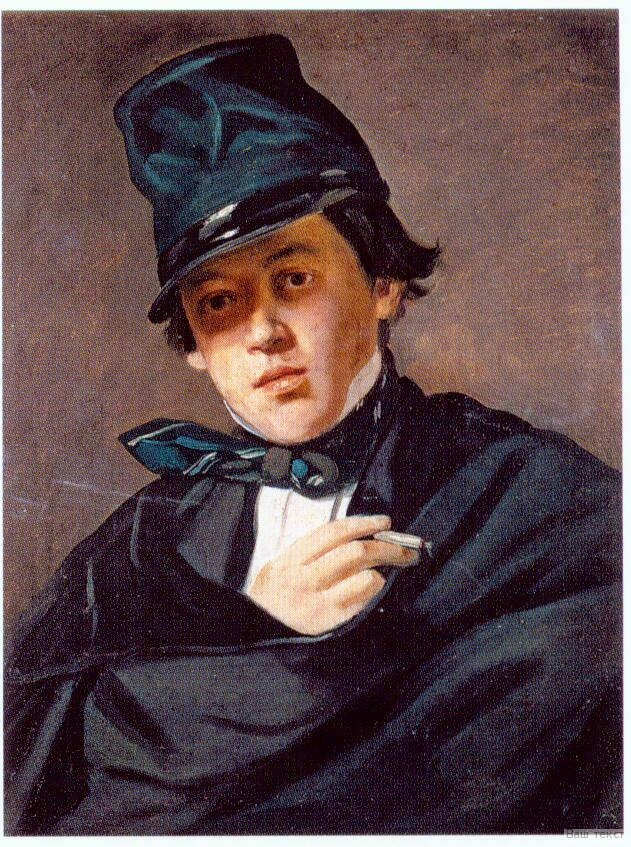 В Государственной Третьяковской галерее хранится портрет Давыдова И.Г., написанный его другом И. А. Кабановым (1823–1869). На обороте холста – надпись: «Портрет Ив. Григ. Давыдова умершего в Риме 6 дек. 1856 г. на 31 году от чахотки, писанный художником Кабановым».